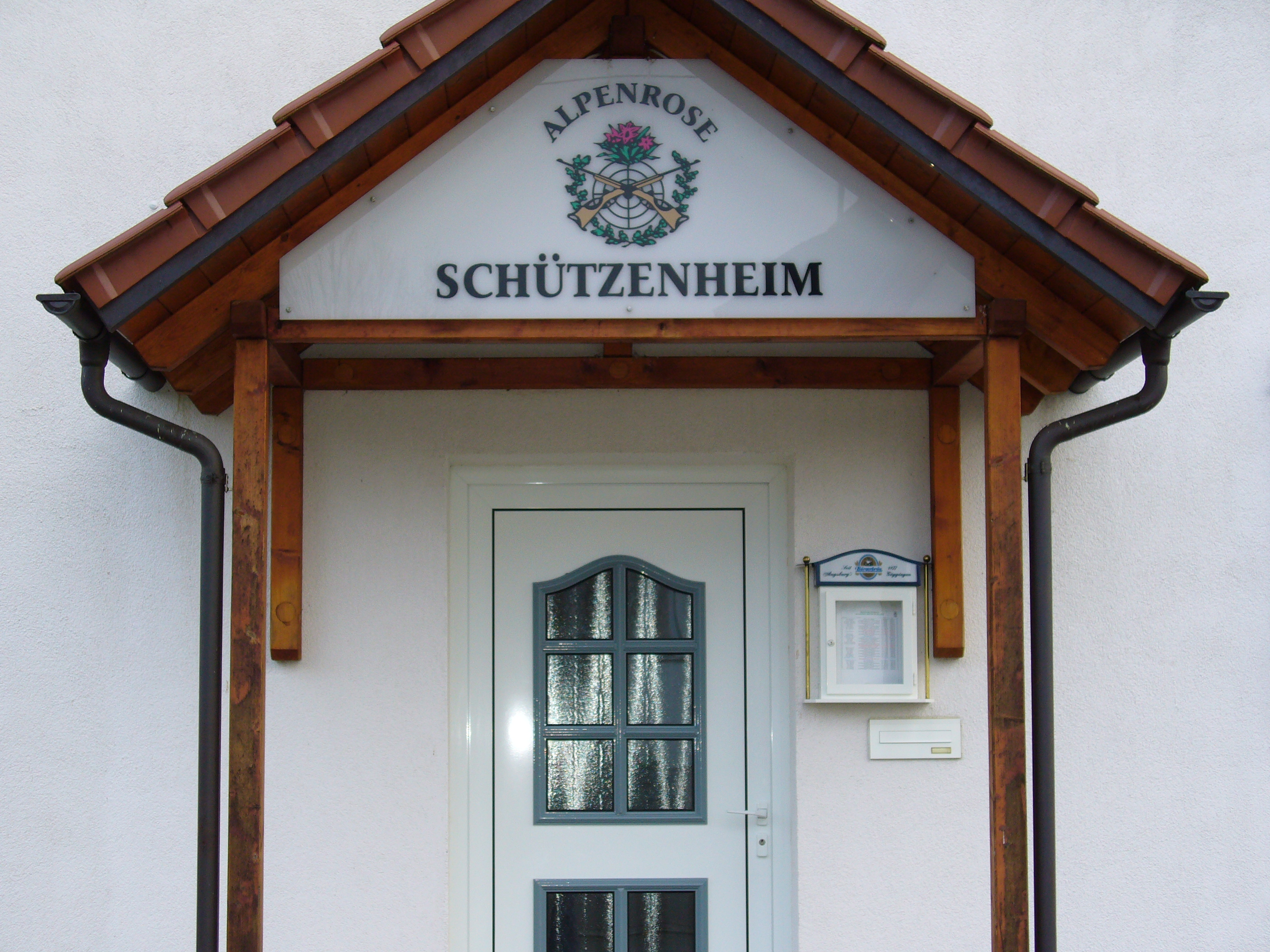 Schützenheim Hausen